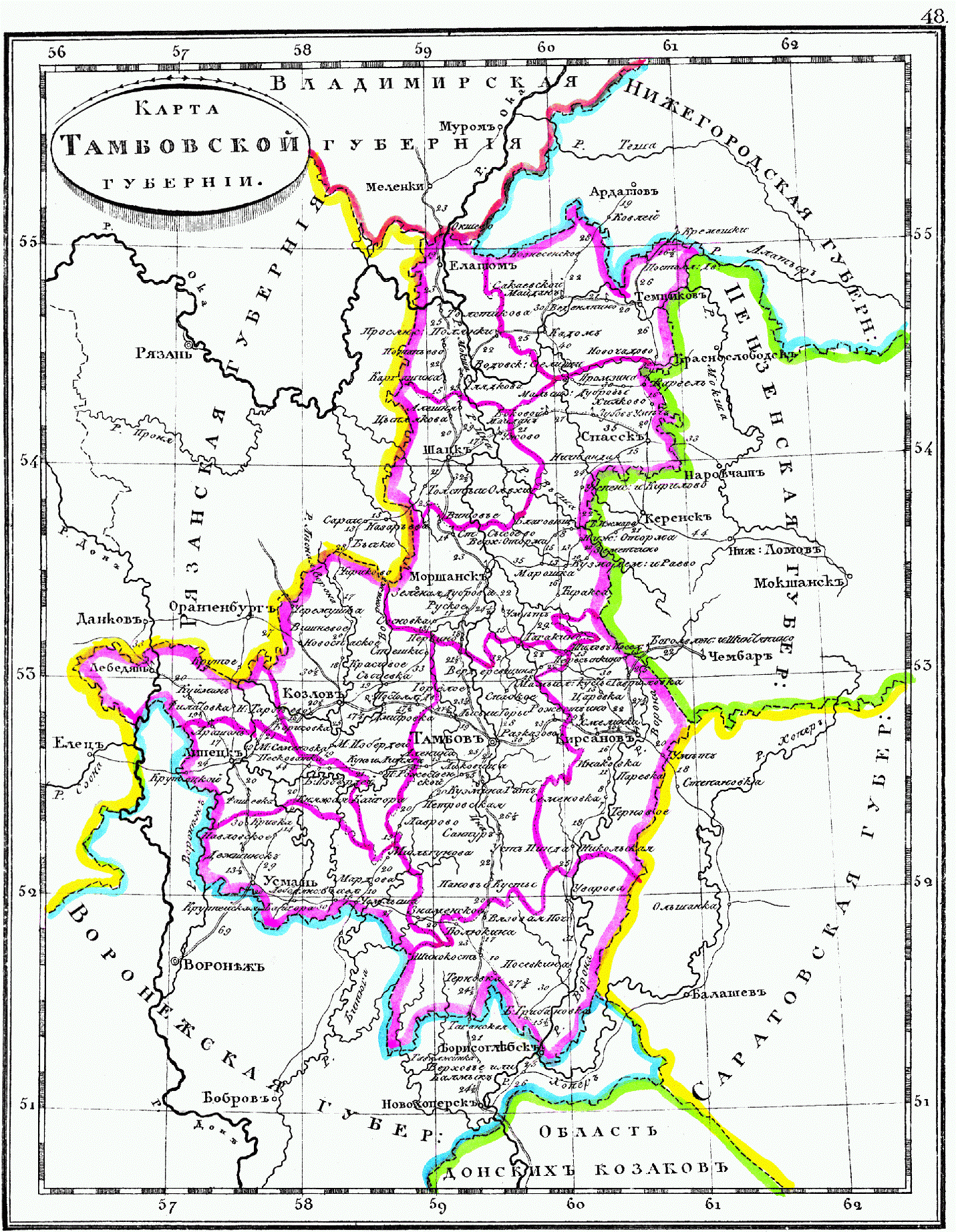 Карта Тамбовской губернии, 1835